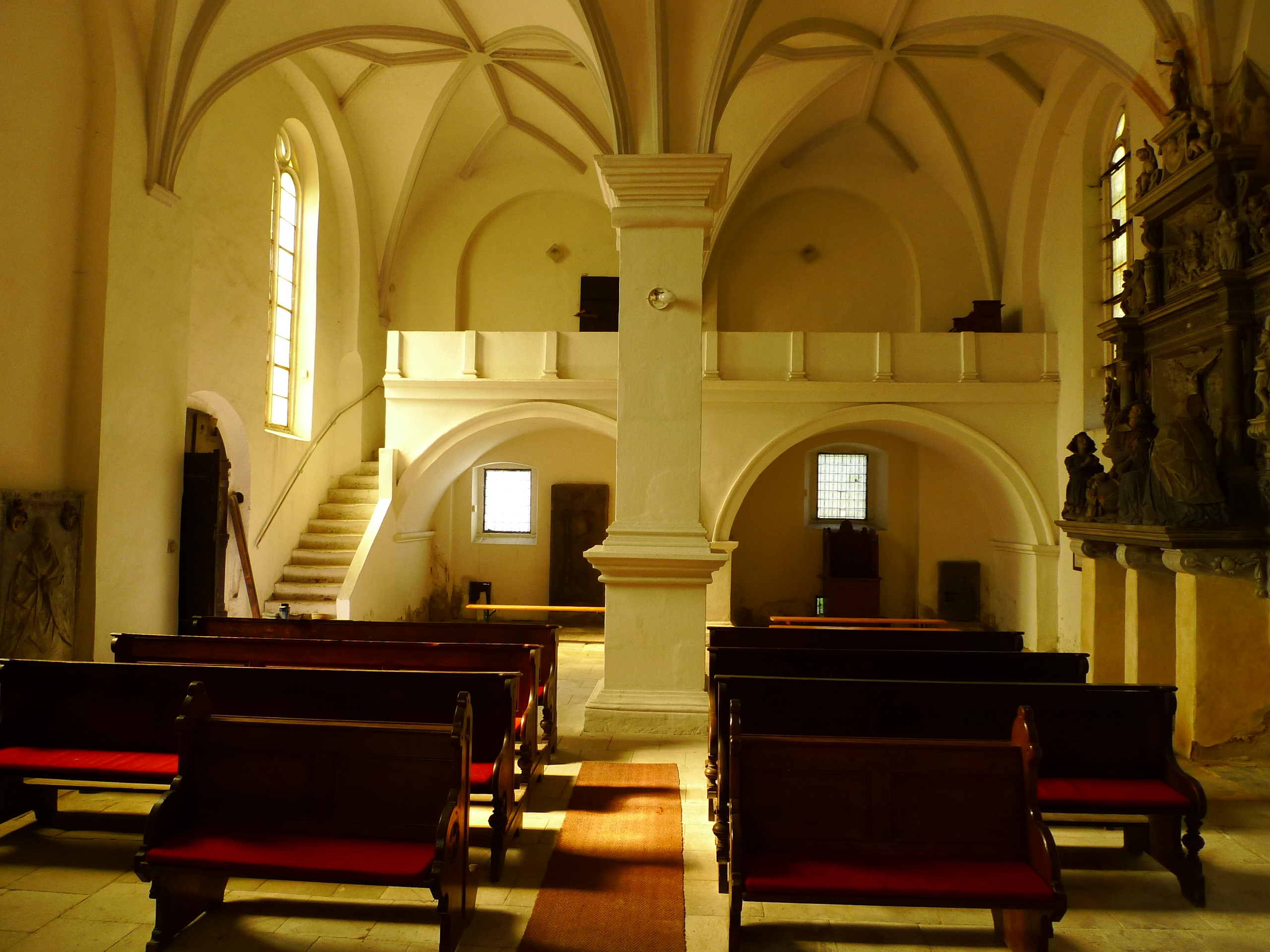 Kostel svatého Václava, Valtířov.